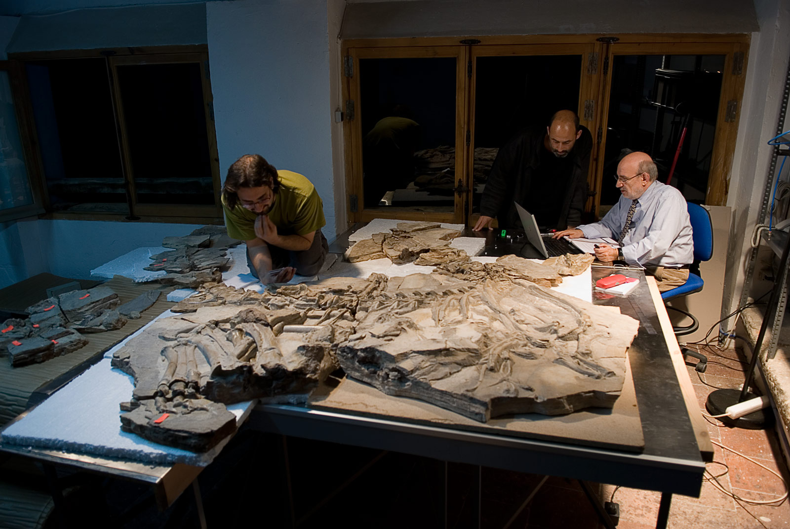 De izquierda a derecha: Fernando Escaso (UNED), Francisco Ortega (UNED), y José Luis Sanz (UAM), trabajan sobre los restos de Concavenator corcovatus. Fernando Escaso (UNED), Francisco Ortega (UNED), and José Luis Sanz working on Concavenator.